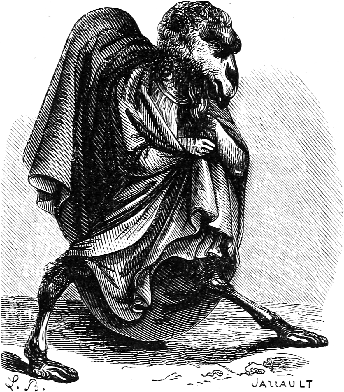 Une illustration pour l’article Wall dans le Dictionnaire infernal par Collin de Plancy.